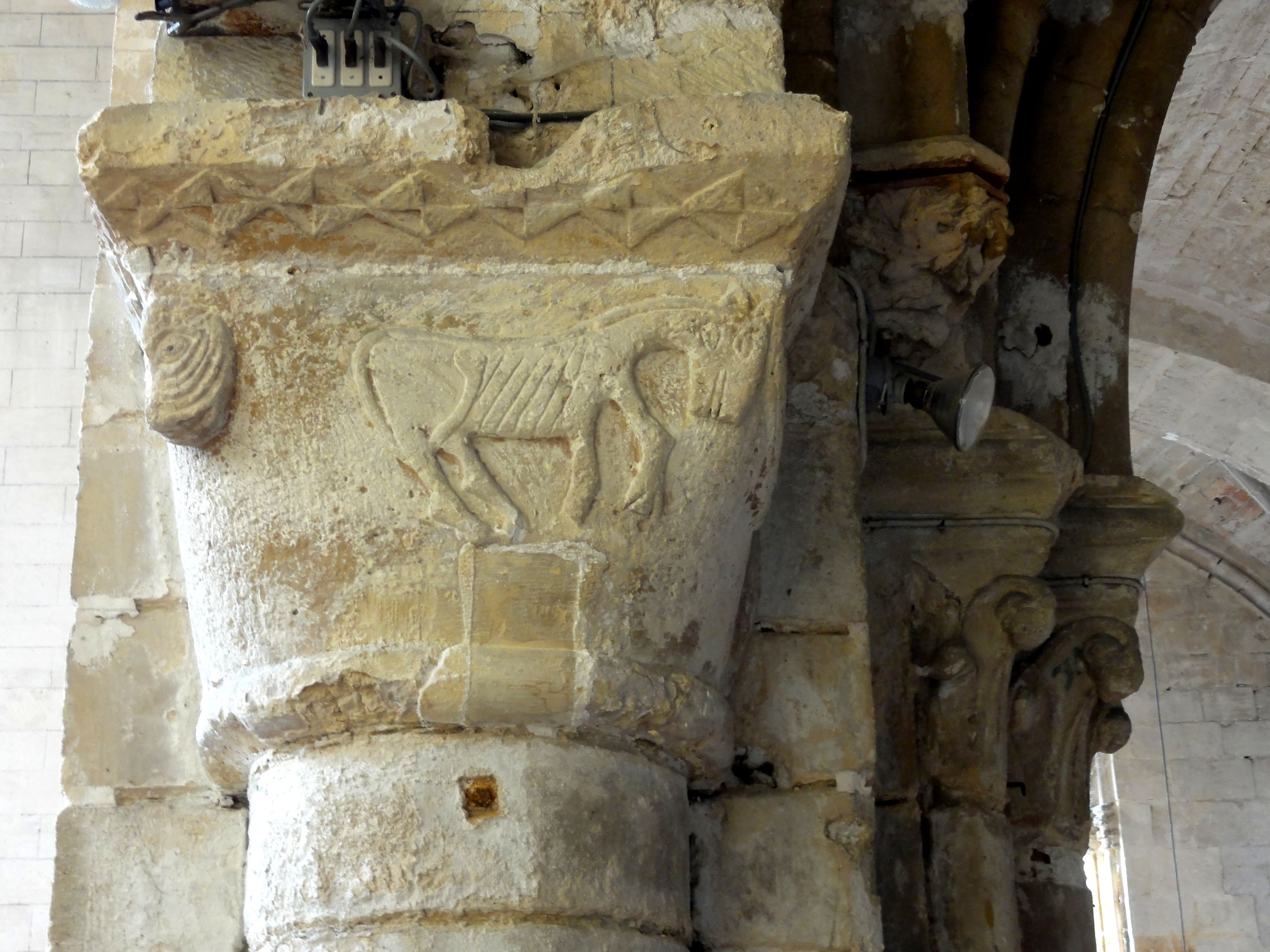 Chapiteaux du pilier sud-est de la croisée du transept.